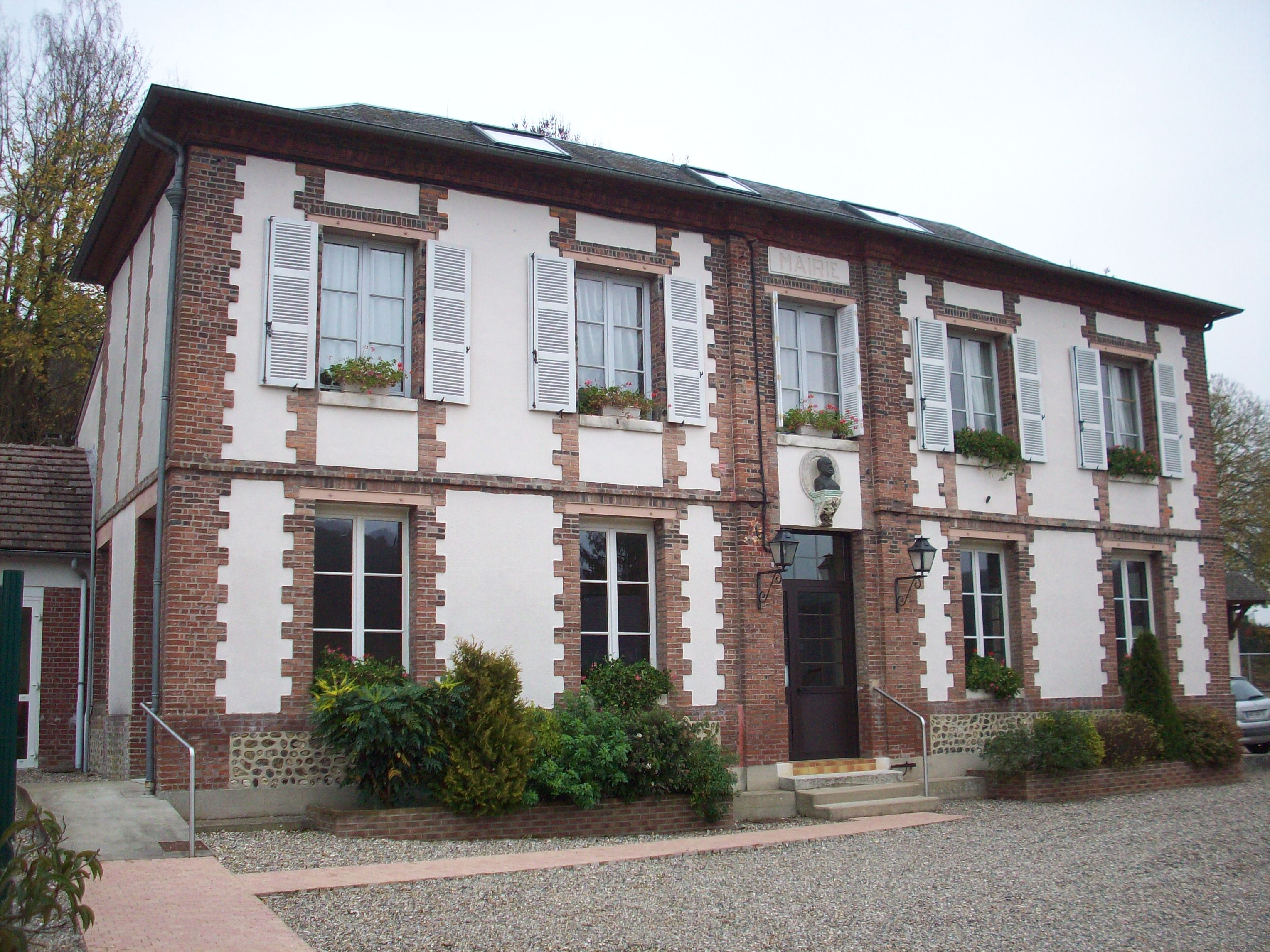 Mairie de Saint-Denis-le-Thiboult.